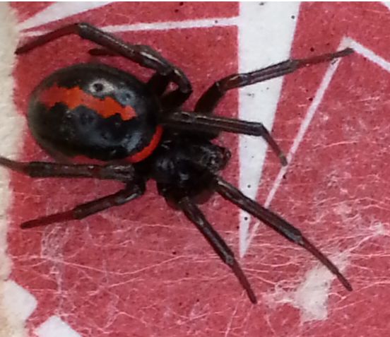 עכביש כדורית אדומה שצולם בישראל